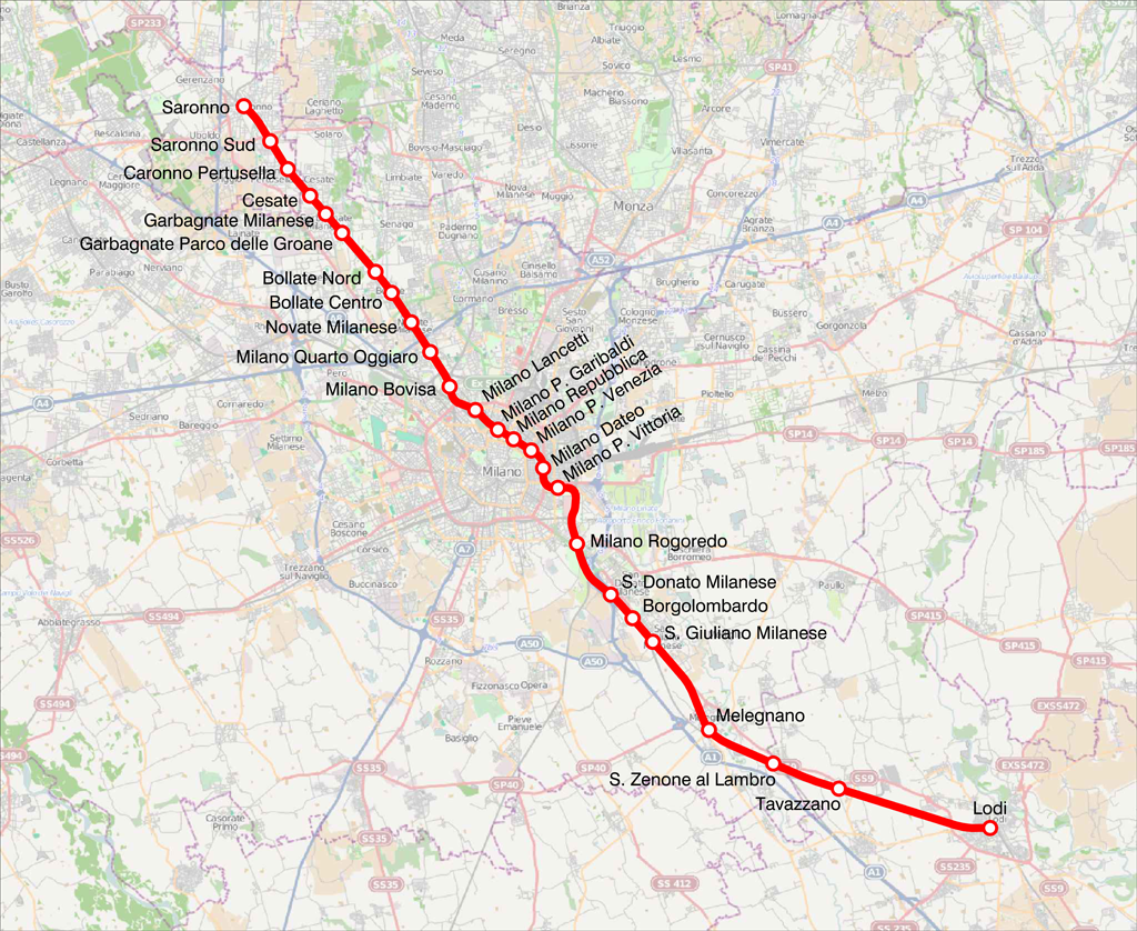 Mappa della linea S1 del servizio ferroviario suburbano di Milano